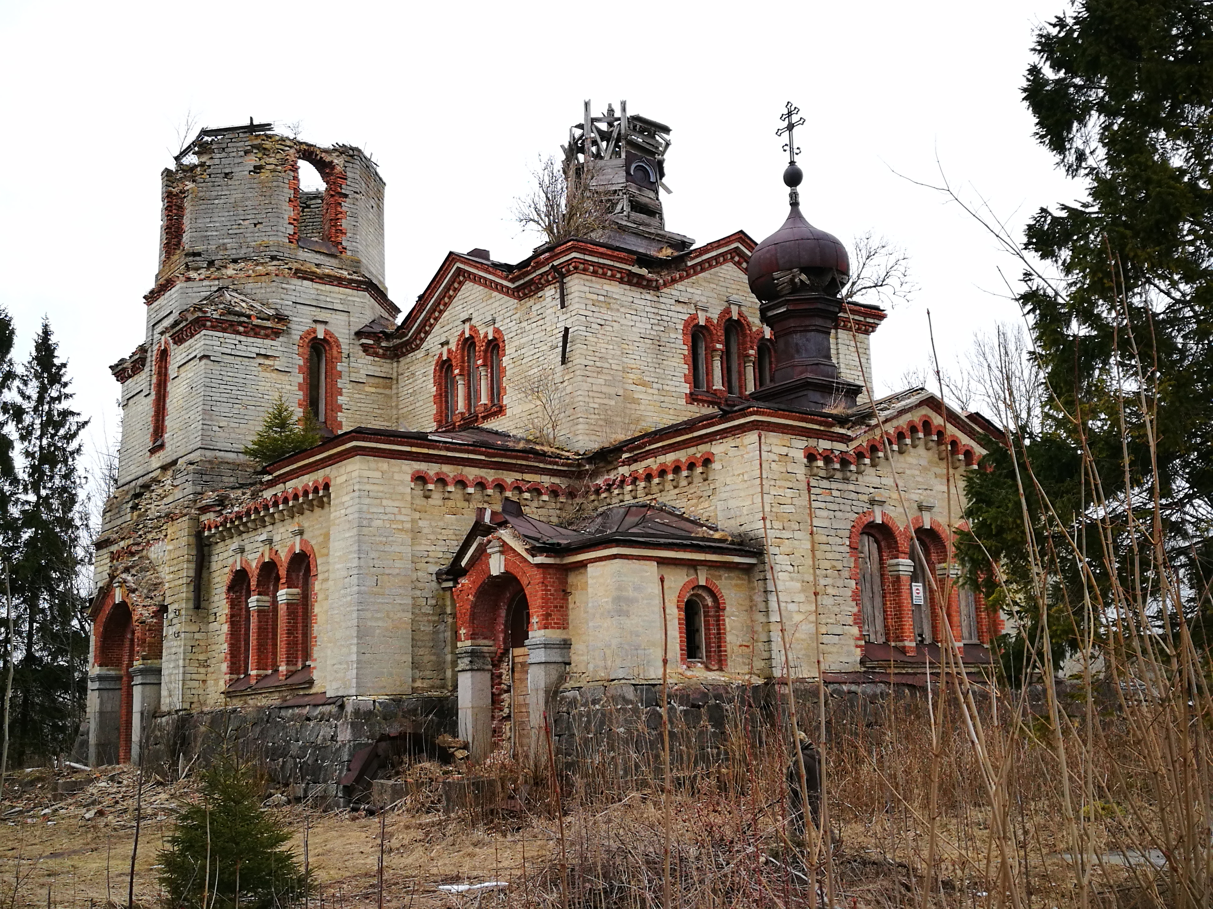 Suure Vassili õigeusu kirik Juurus